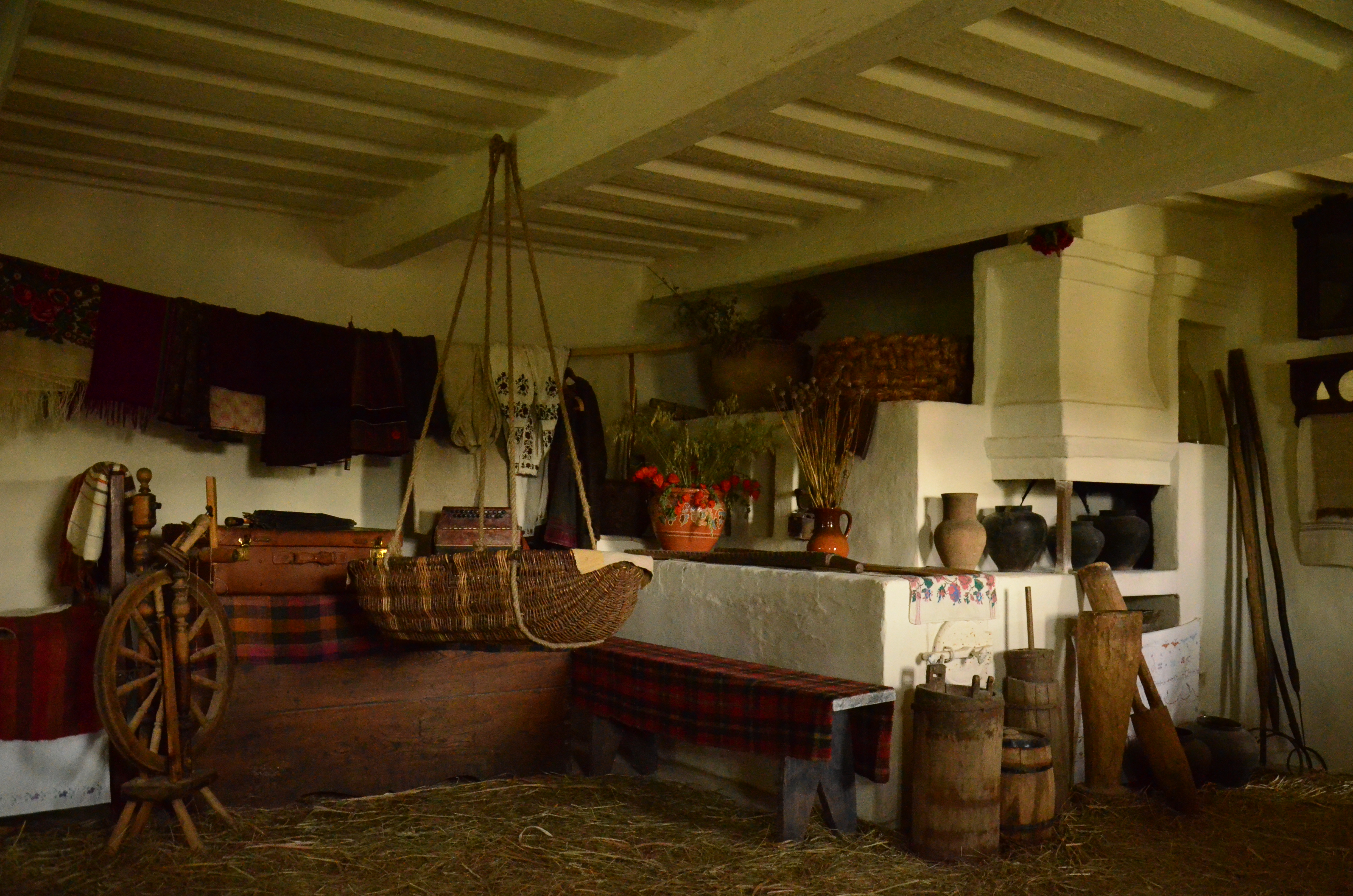 Садиба співака І. С. Козловського, Мар'янівка, вул. Шкільна, 3